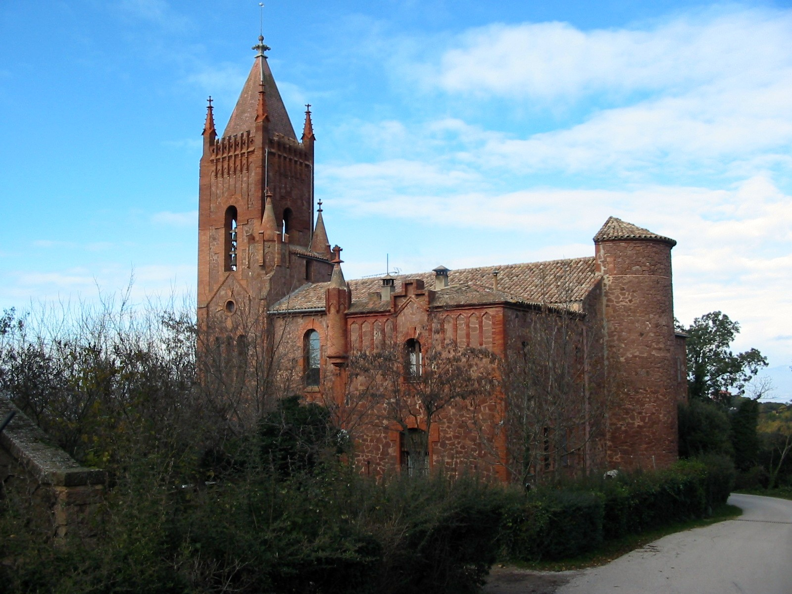 El Sagrat Cor del Mas Can Casademunt en el Brull